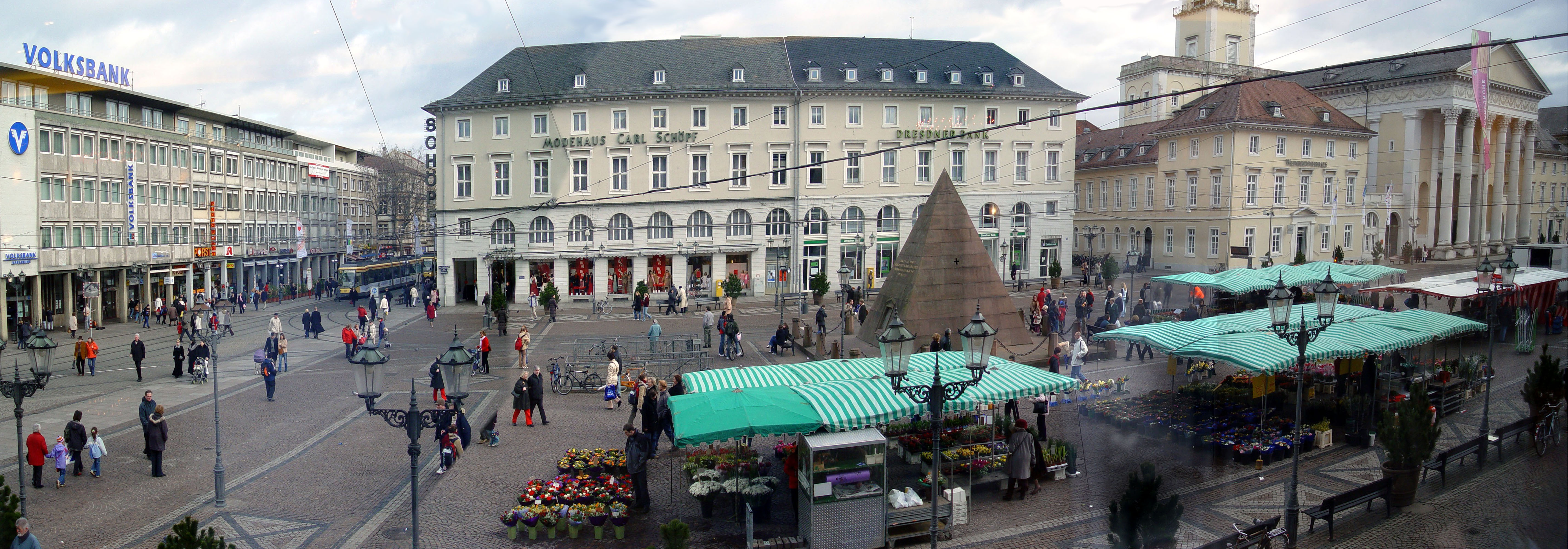 Gemeinfrei, fotografiert von Martin Dürrschnabel Motiv: Marktplatz Karlsruhe Das Bild wurde aus mehreren Bildern zusammengesetzt und durch eine Scheibe fotografiert, dadurch unschöne Spiegeleffekte.